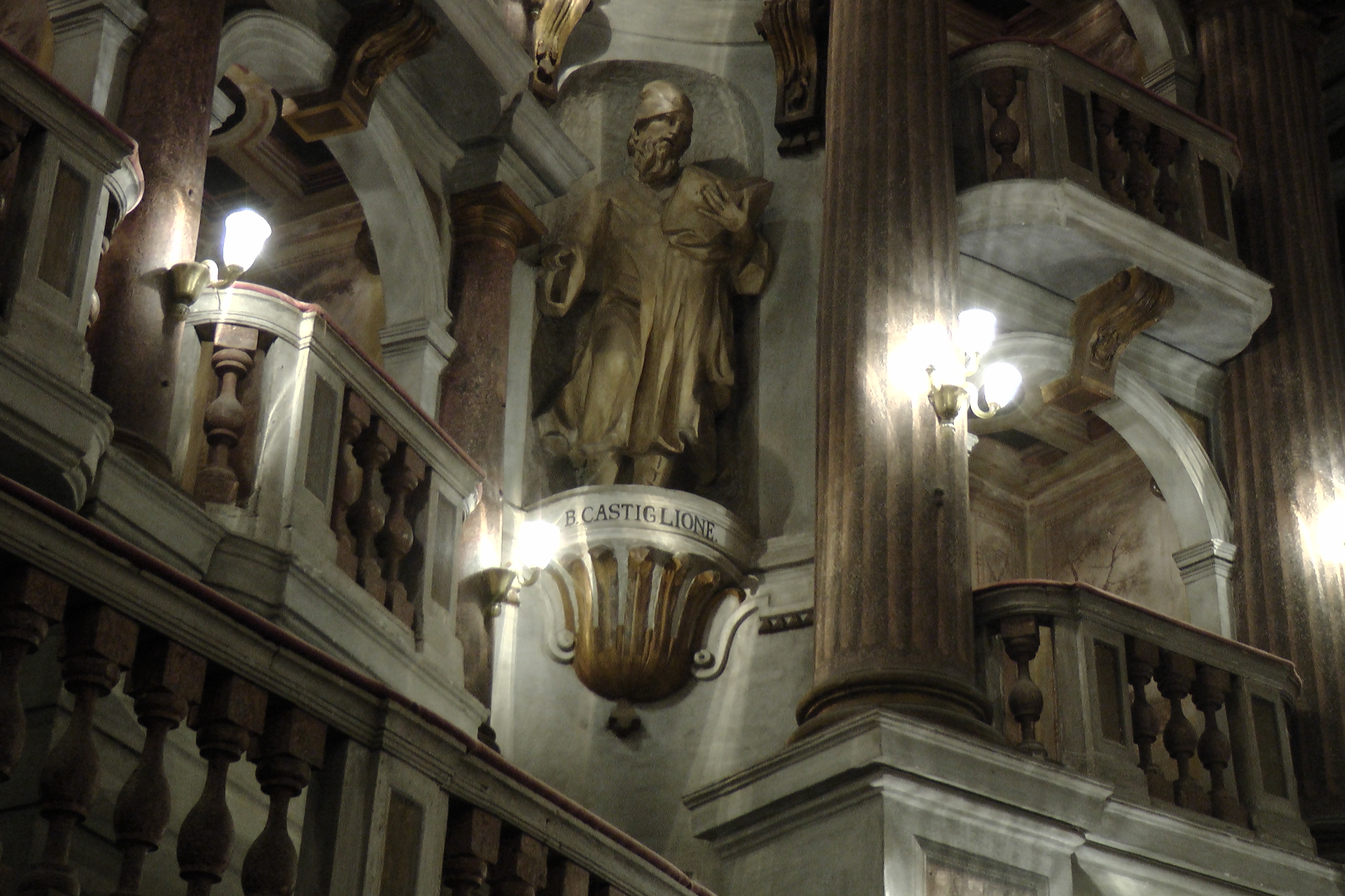 Teatro scientifico Bibiena This is a photo of a monument which is part of cultural heritage of Italy.